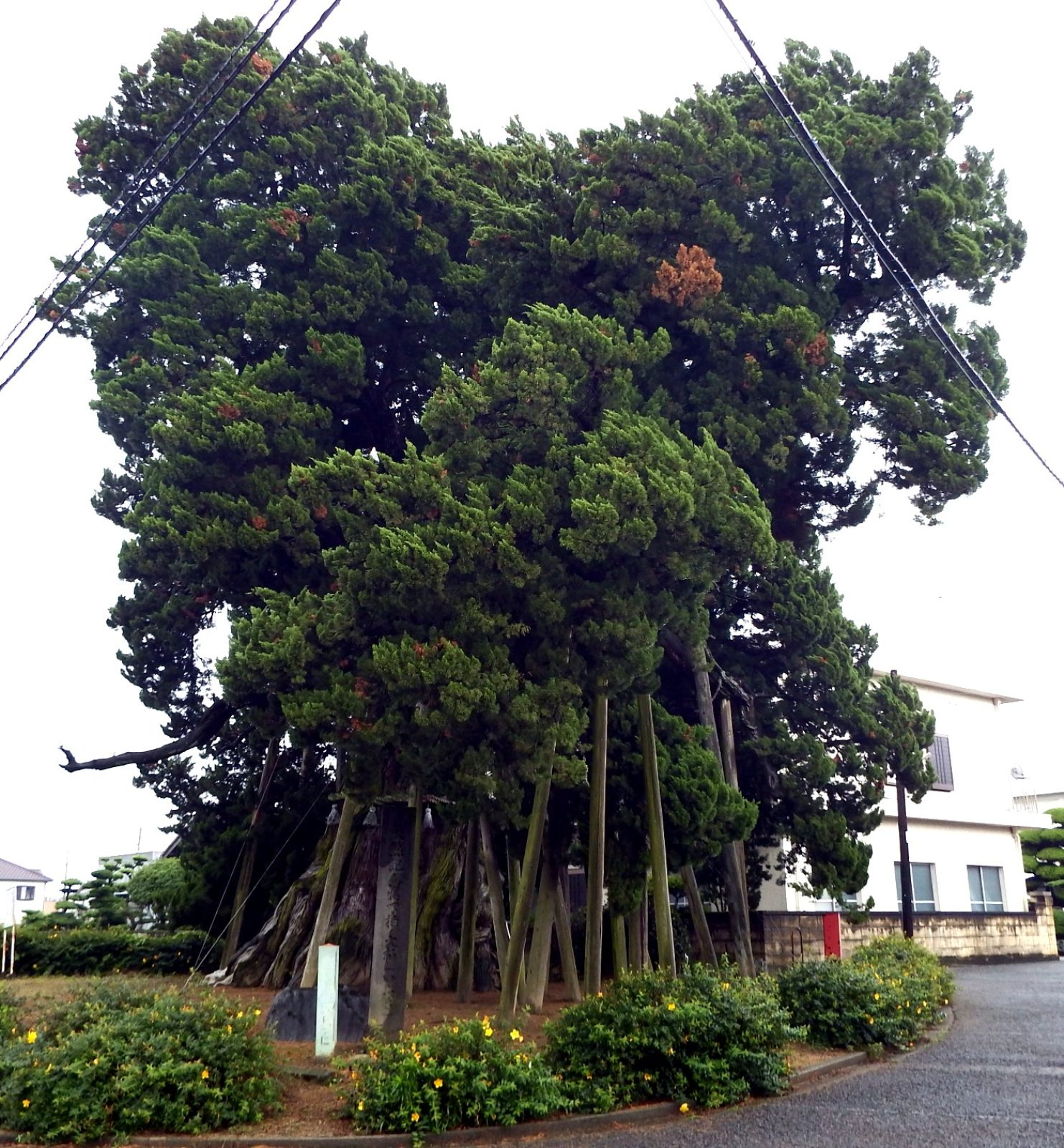 下柏の大泊（国の天然記念物）